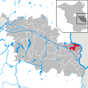 Wiesenau in Brandenburg (Country) - District Oder-Spree